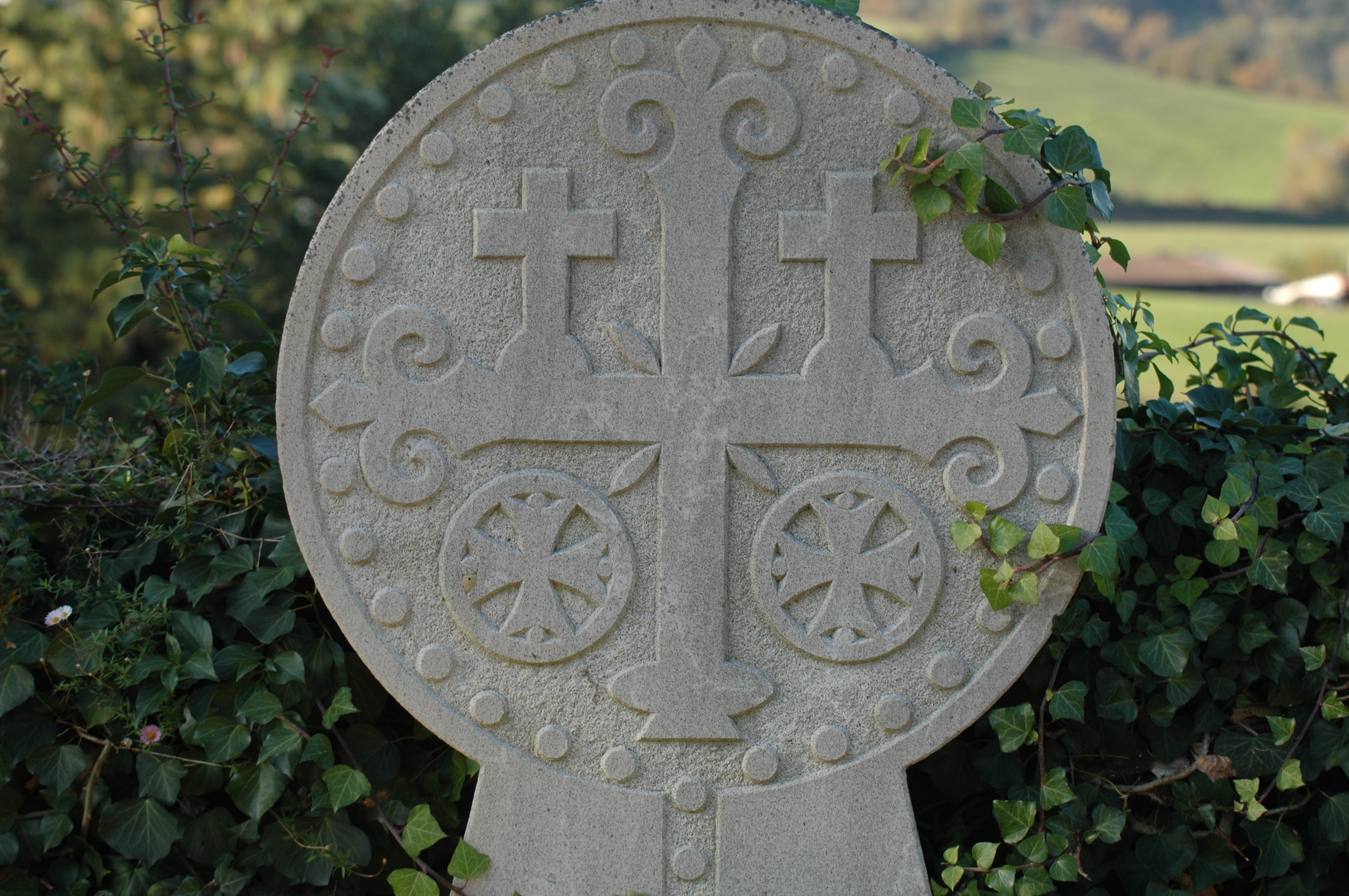 Sare, stèle basque